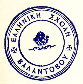 Печат на гръцкото училище във Валандово